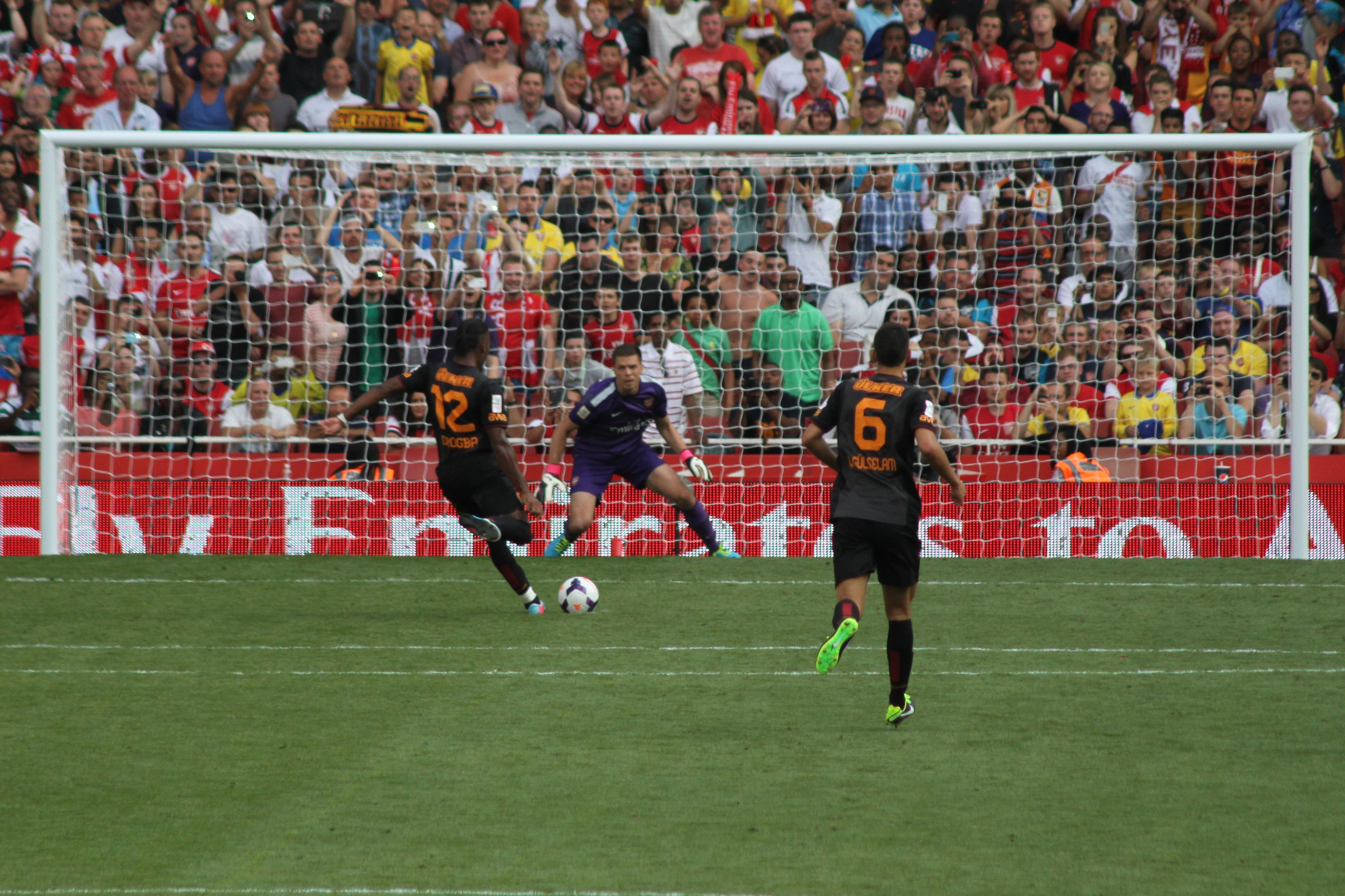 Drogba taking penalty for Galatasaray in 2013.